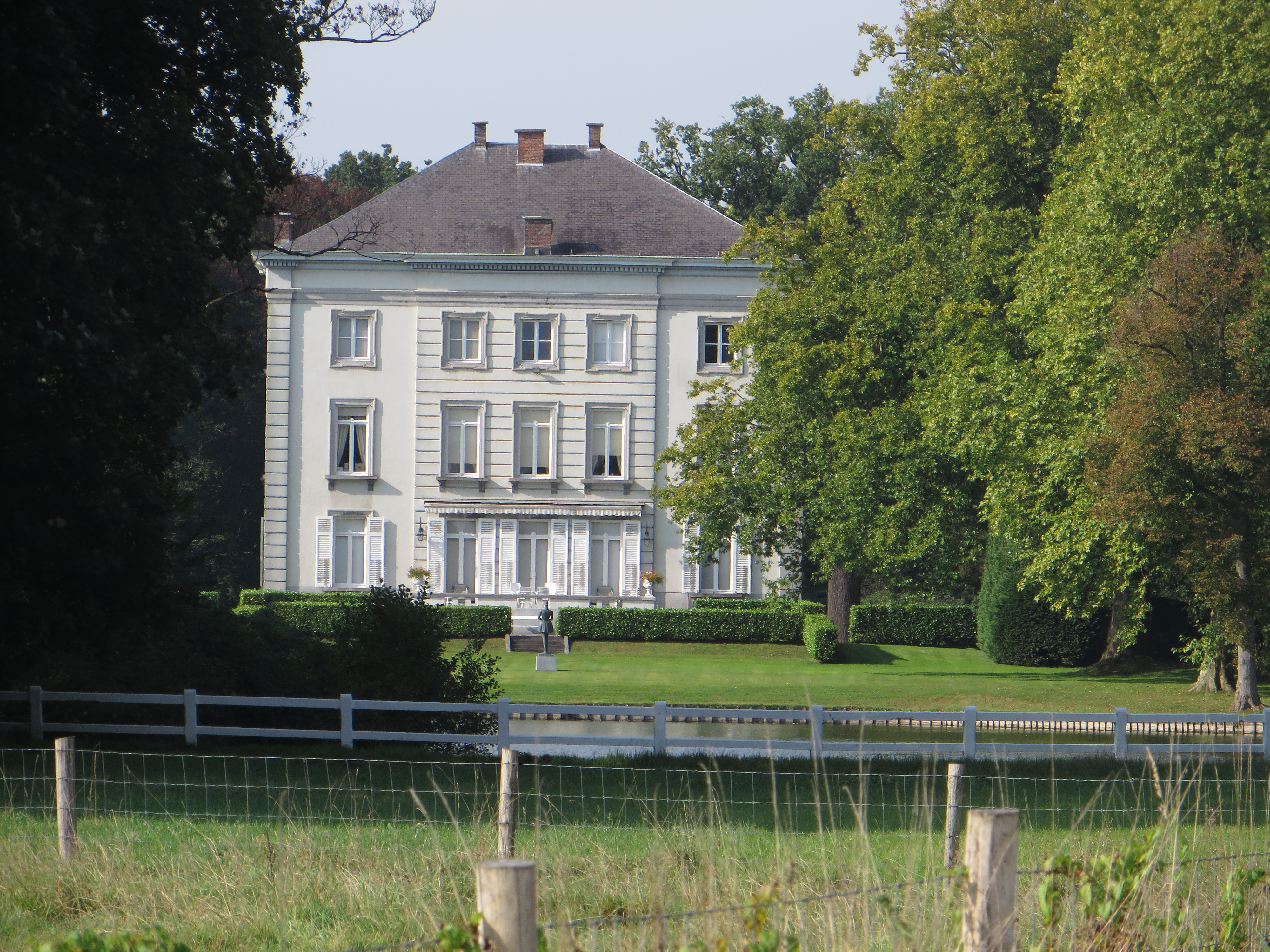 Kasteel Grand Noble, De Pinte. Landhuis in neoklassieke stijl, afgewerkt ca. 1860; op locatie van een eerder landhuis, afgebroken in jaren 1850